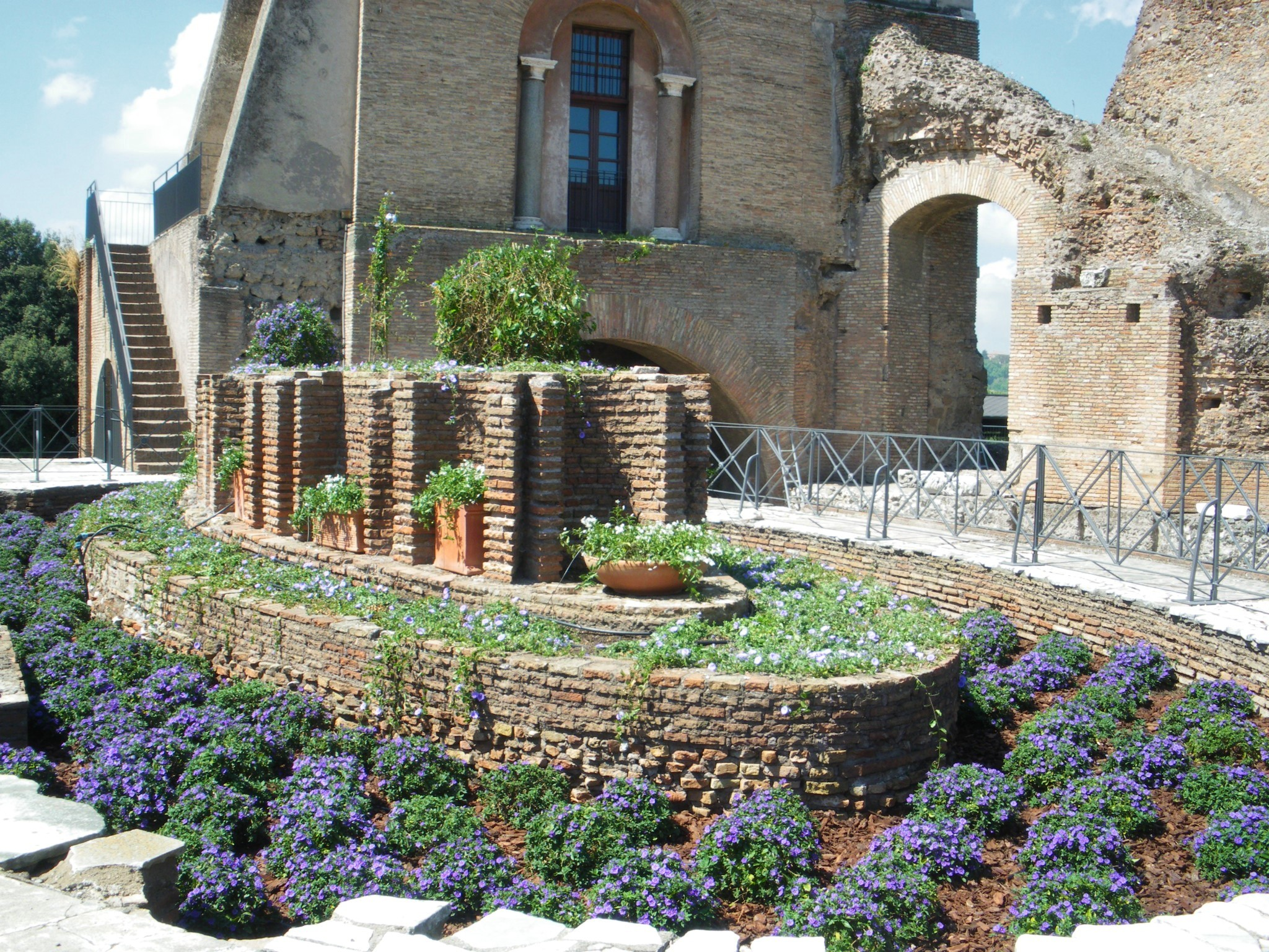 Vestiges d'une des fontaines ovales du Cenatio Iovis